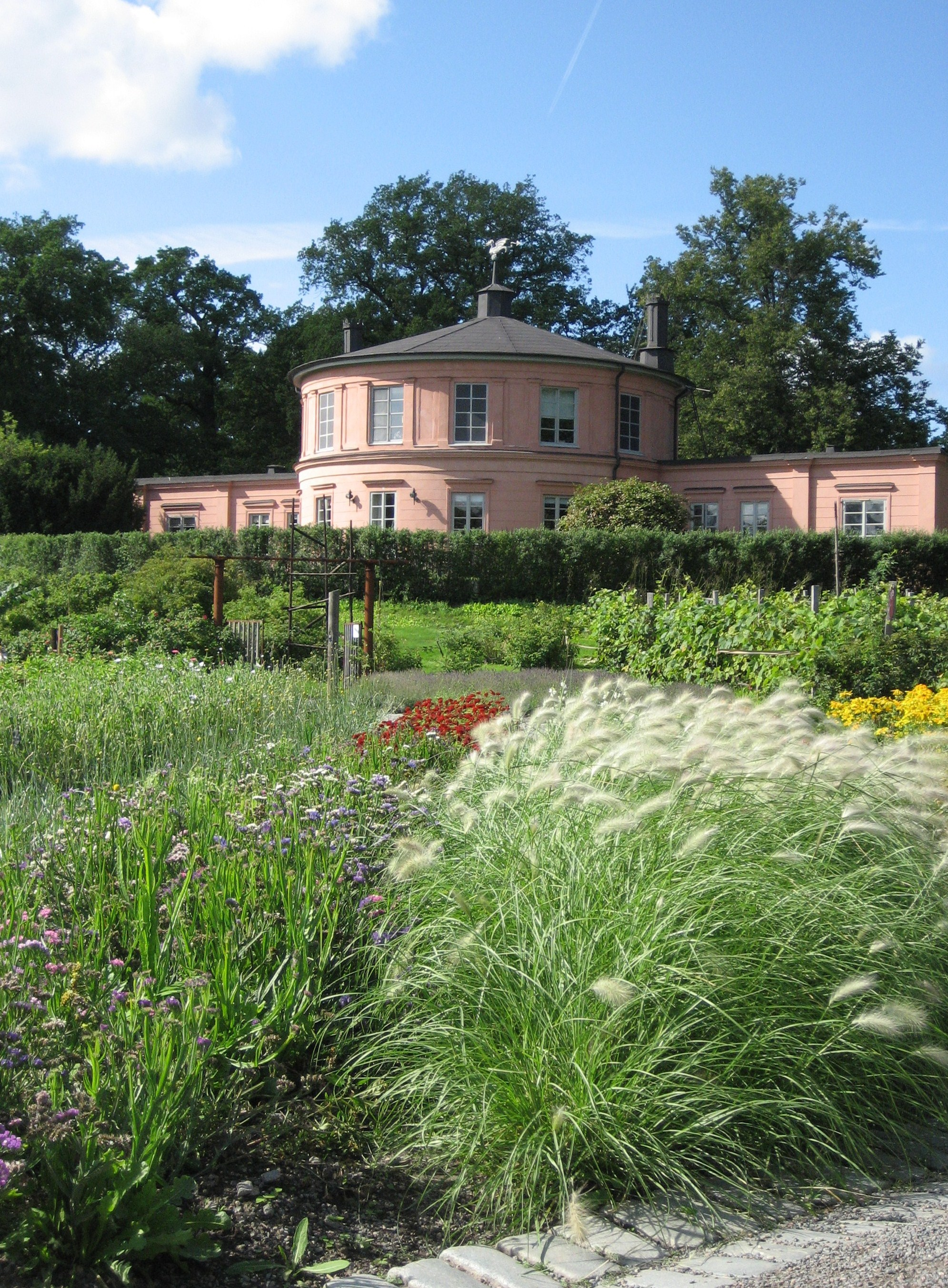 Rosendals trädgård på Djurgården, en del av Rosendals slott.